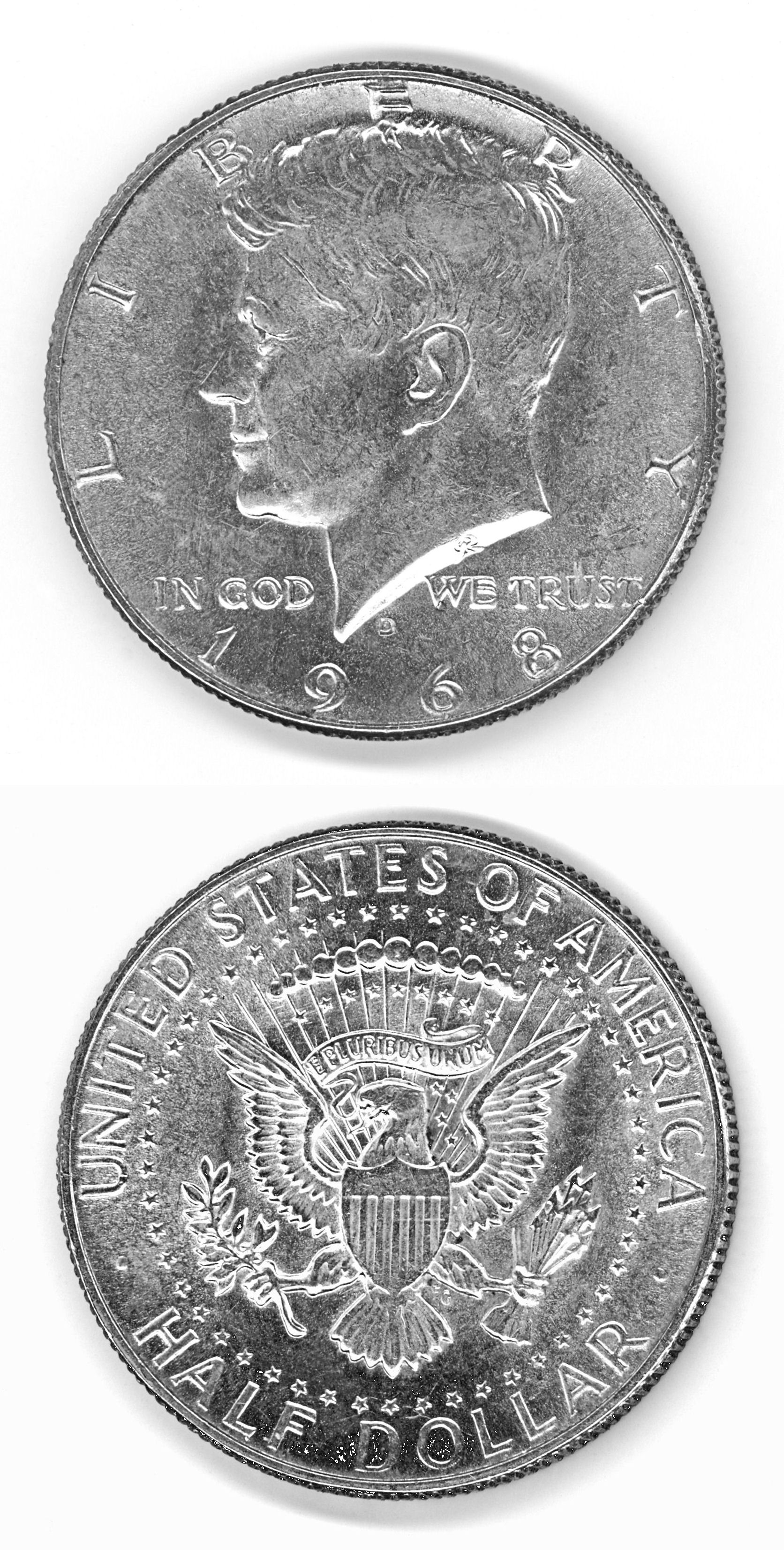 Half Dollar Münze (USA), 1968 Motiv: John F. Kennedy, Vorder- und Rückseite